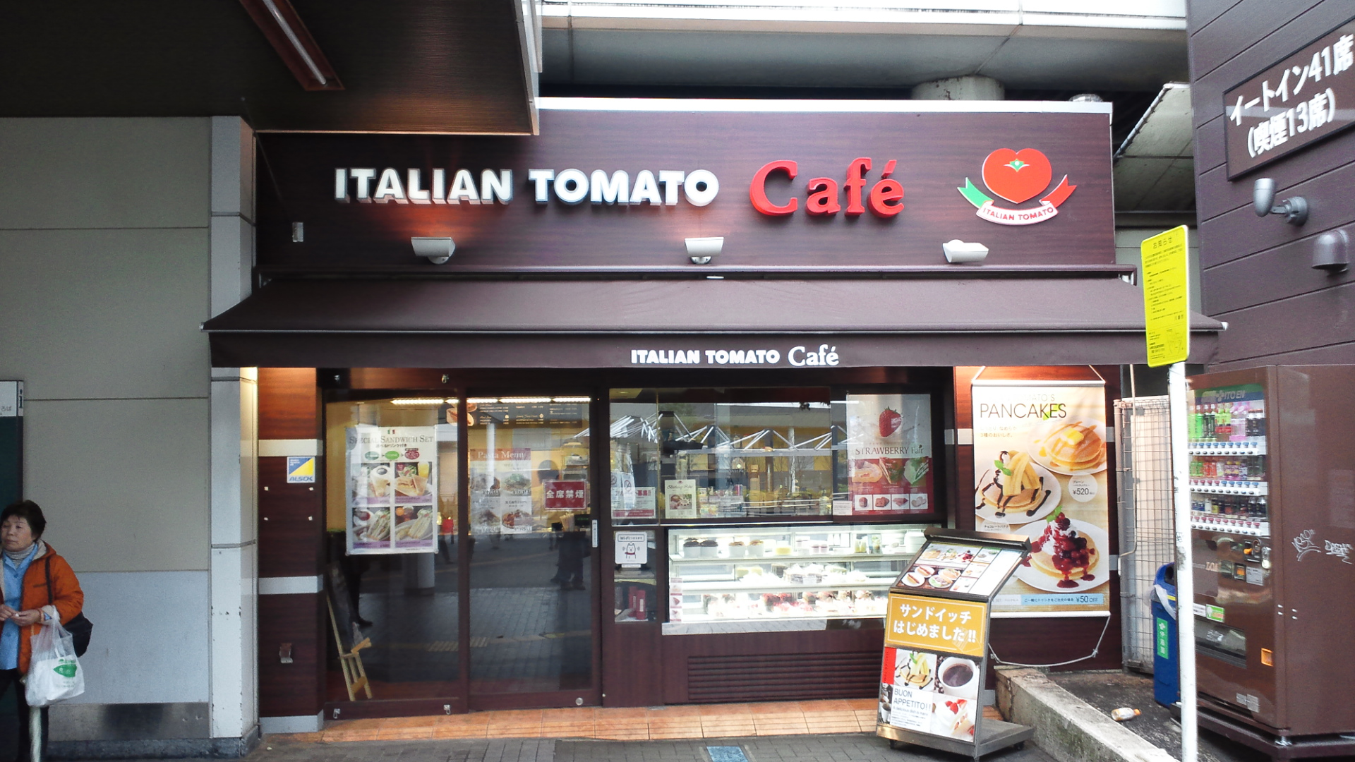 イタリアントマトカフェ川崎駅西口店